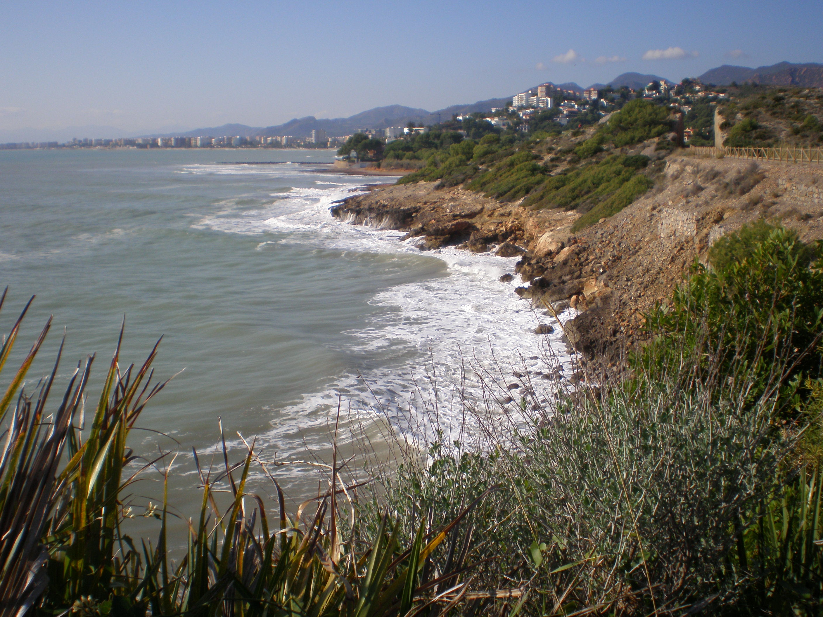 Oropesa del Mar